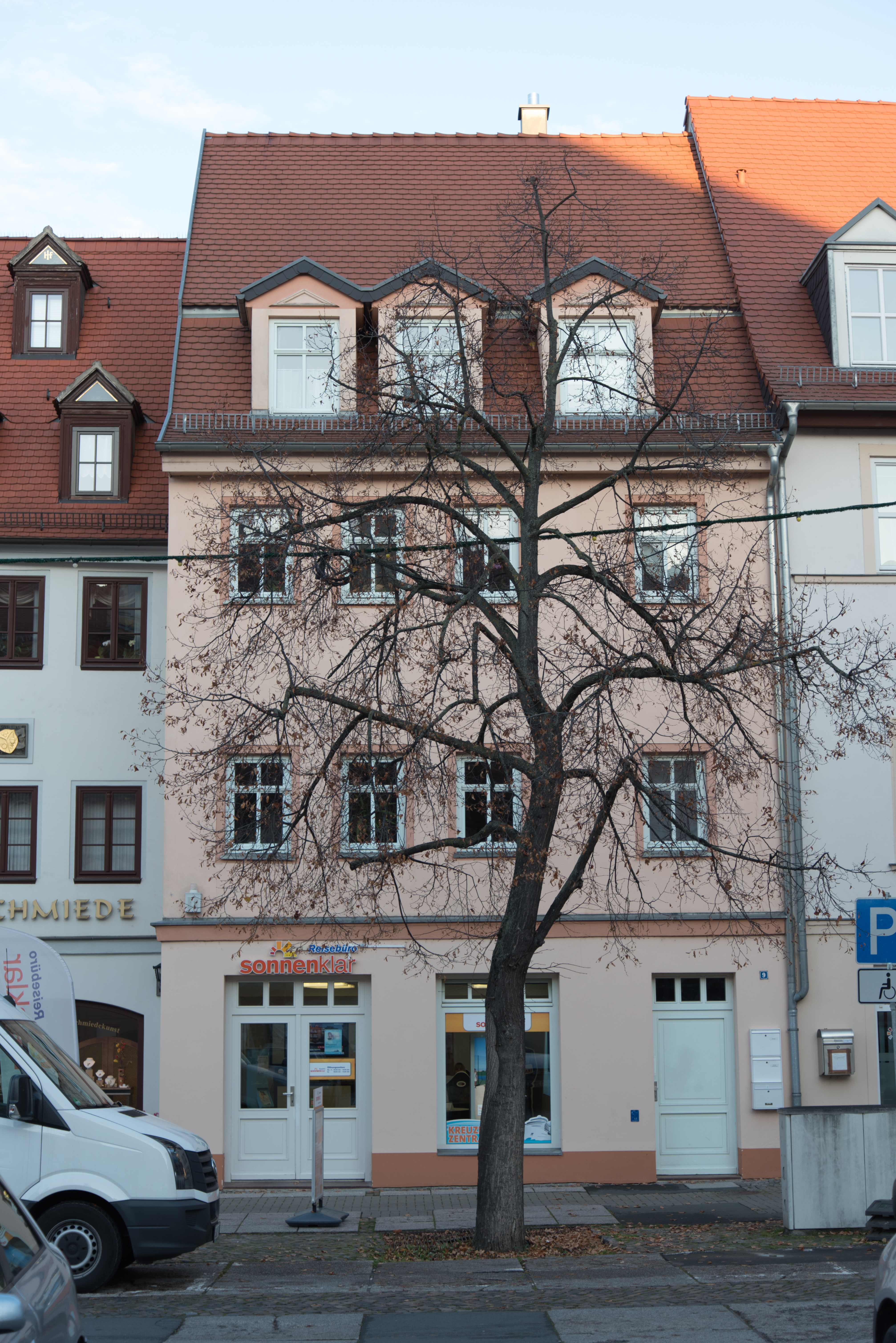 Weißenfels, Markt 9